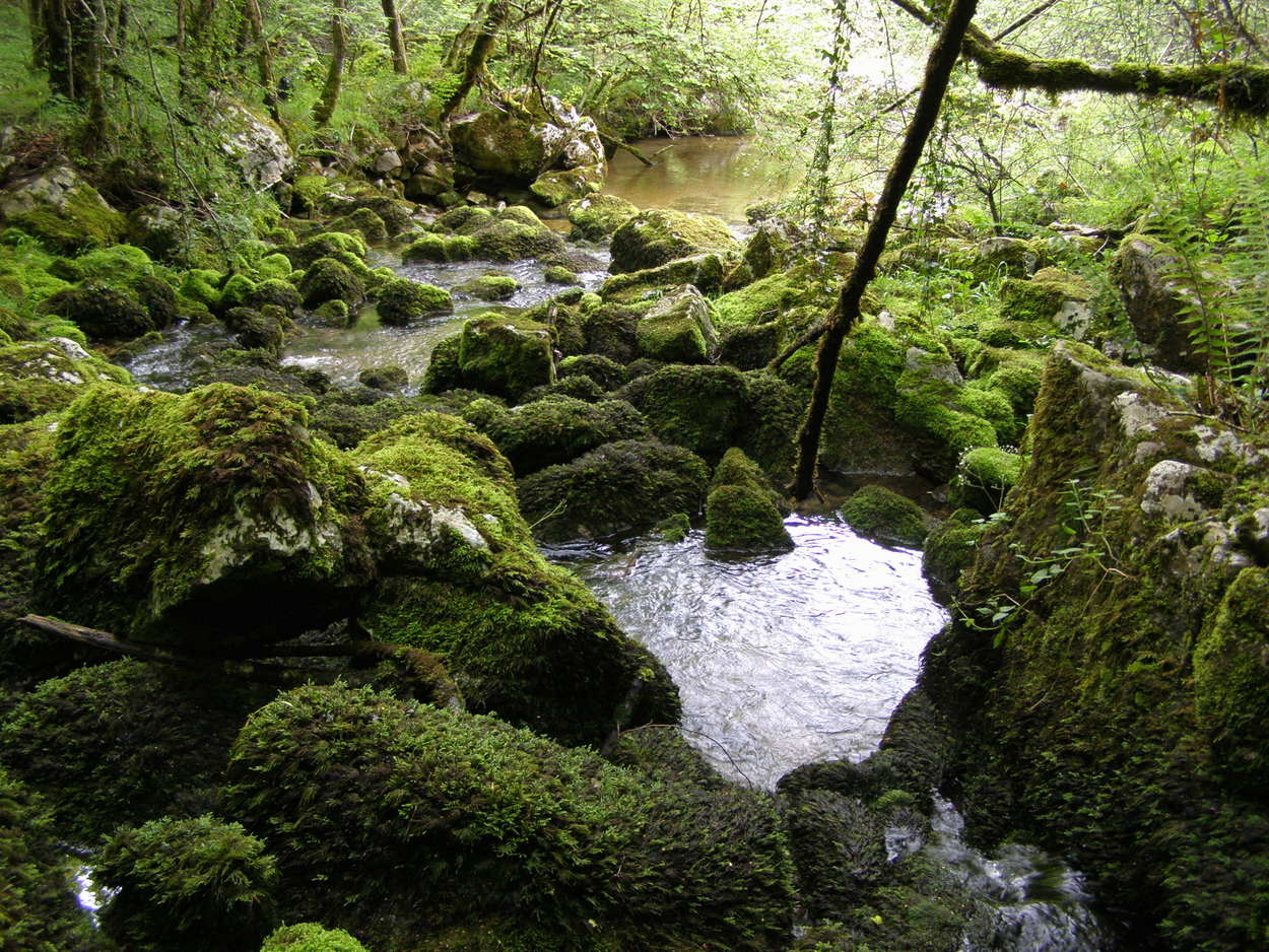 Una de las fuentes del río Latarmá (España)